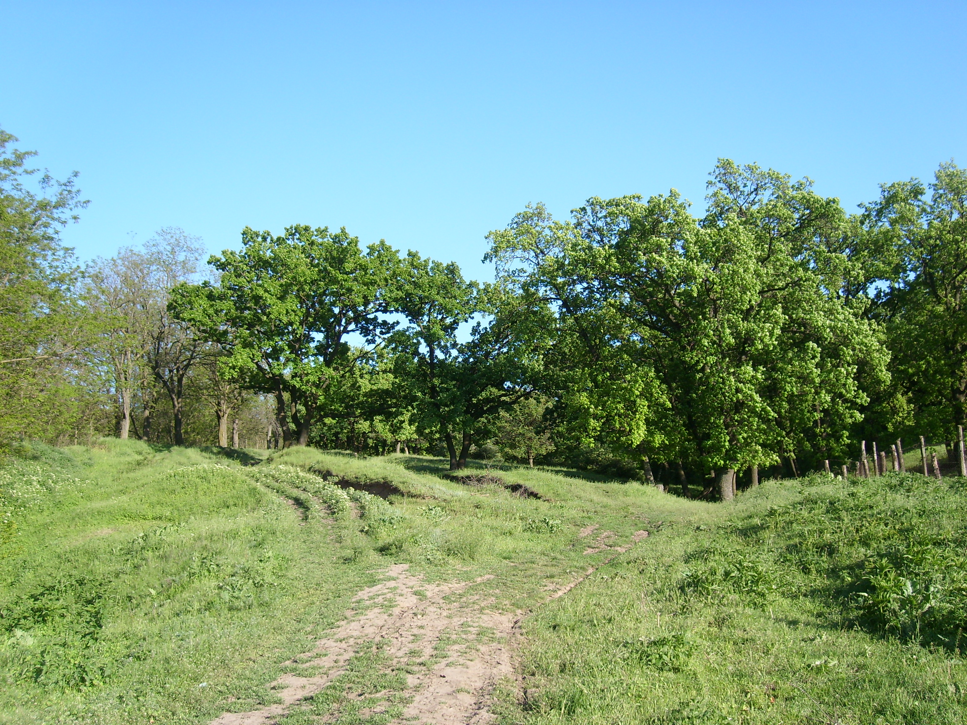 Pădurea din Fundoaia